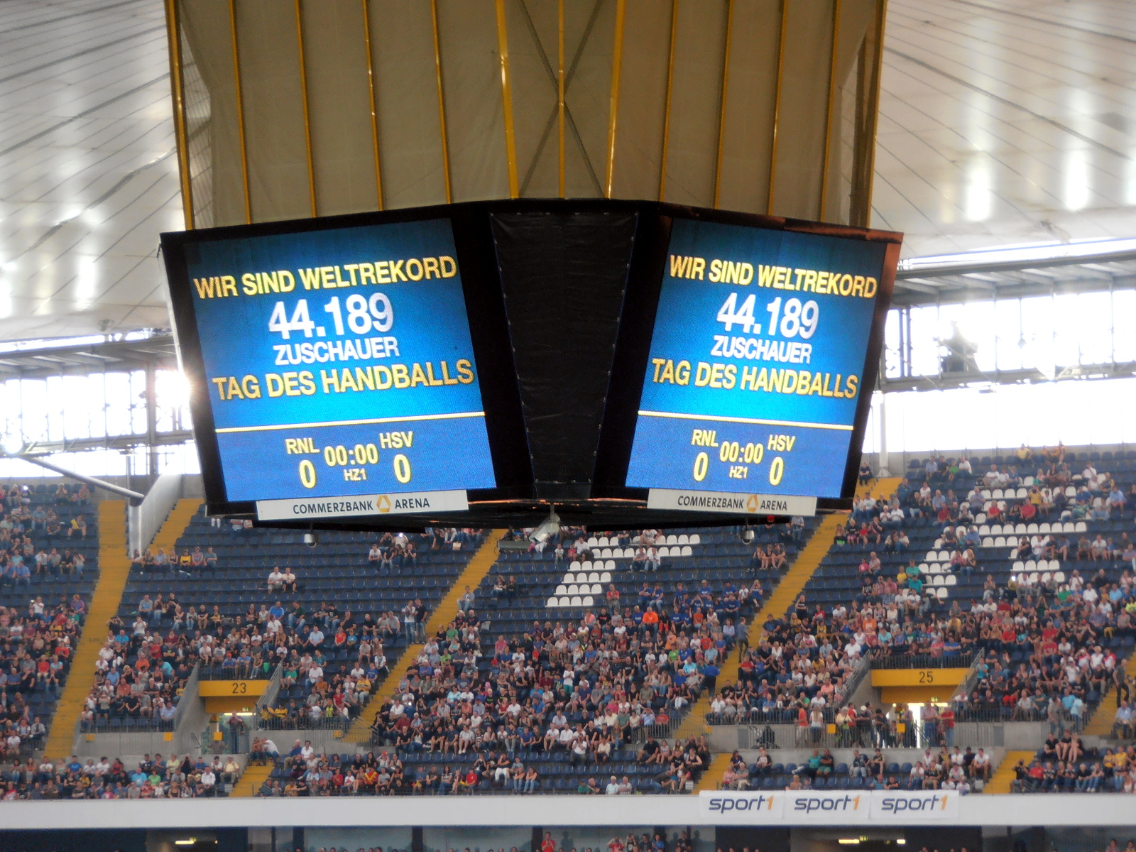 Die Zuschauerzahl zum Handballspiel Rhein-Neckar Löwen gegen HSV Hamburg am 6. September 2014 in der Frankfurter Commerzbank-Arena, am Tag des Handballs.